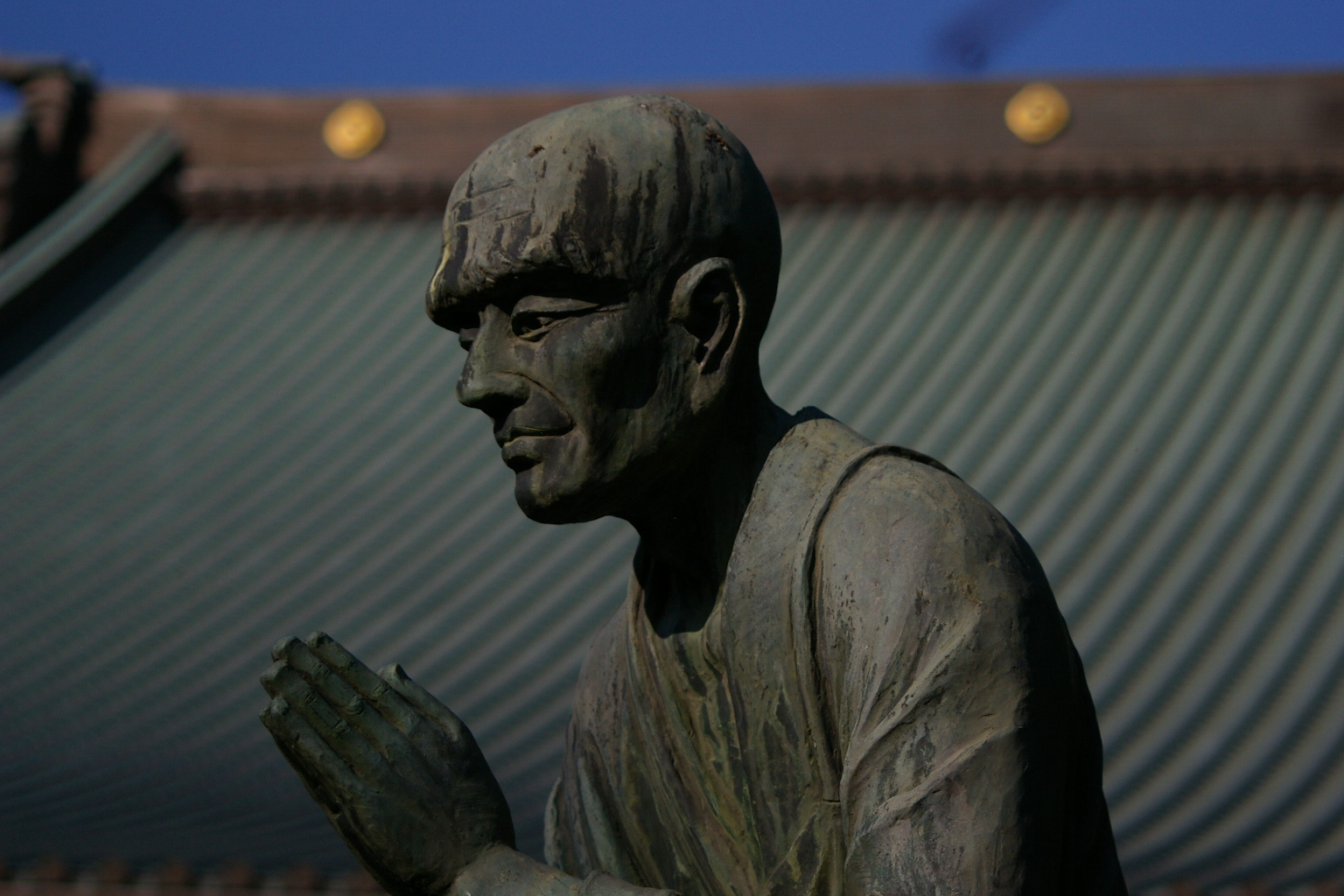 藤沢市清浄光寺一遍上人銅像